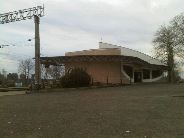 ურეკის რკინიგზის სადგური